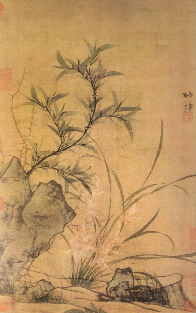 Orchidée et bambou par le peintre chinois Zhao Yong du XIVe siècle. Rouleau en hauteur, encre et couleurs sur soie, peinture réalisé dans la première moitié du XIVe siècle. Ses dimensions en centimètres sont: 74,6x46,4. Il est conservé au Musée de Shanghai.